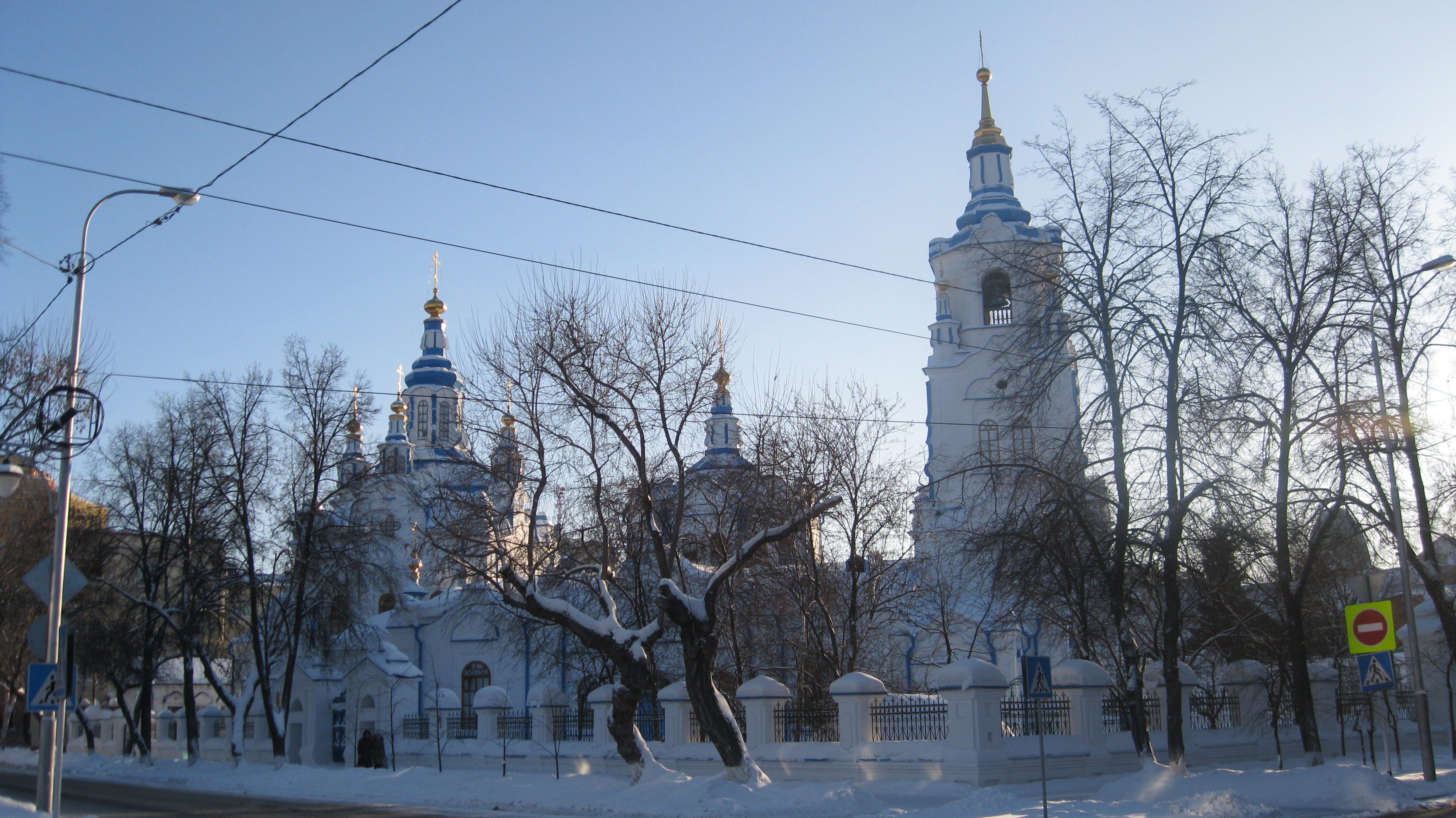 Знаменский кафедральный собор в Тюмени. Вид с перекрёстка улиц Семакова и Володарского.